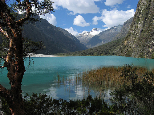 Llanganuco_lagunas_1_ancash